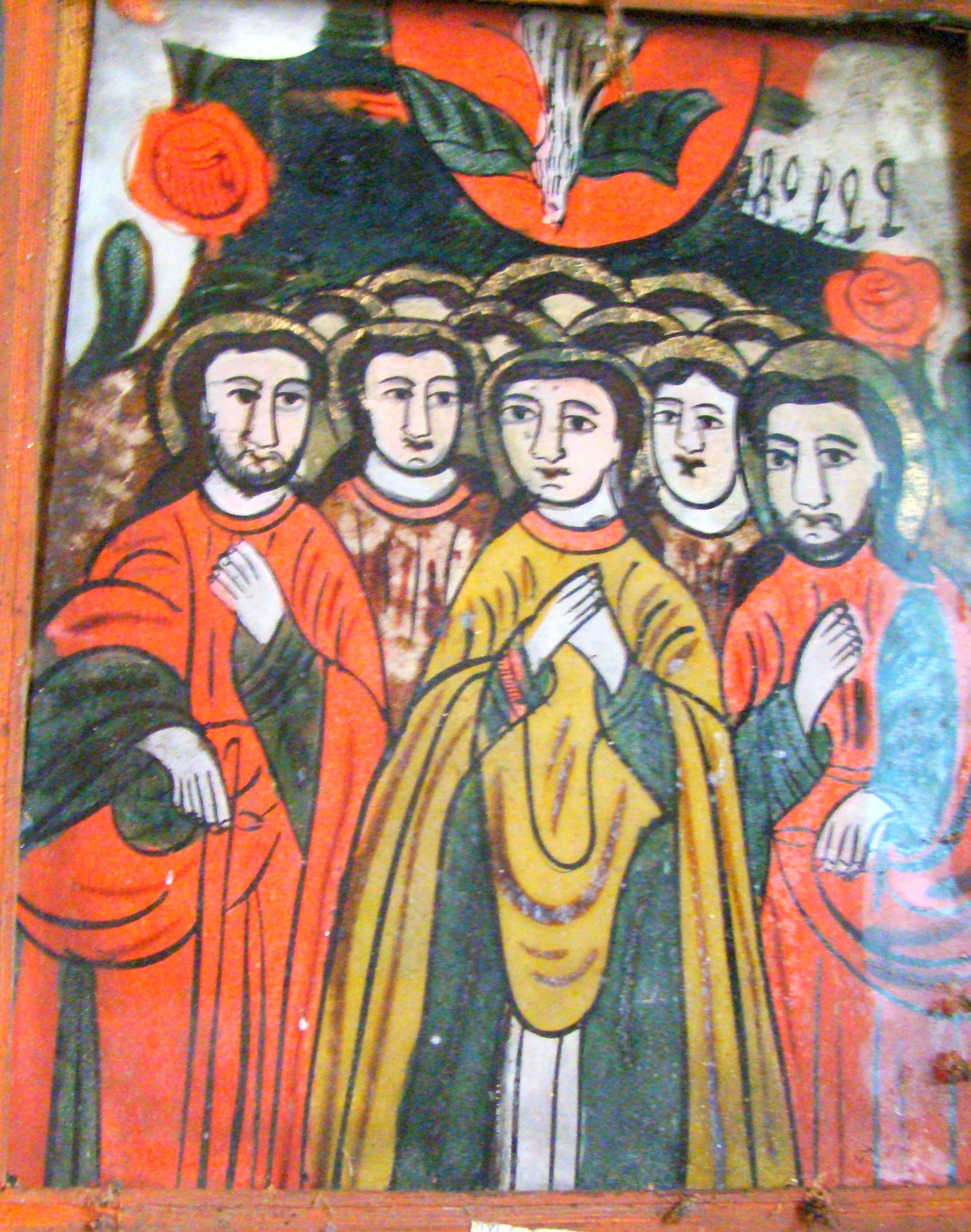 Icoană colecția parohiei Boiereni, județul Maramureș